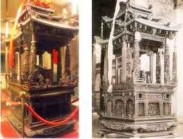 嘉邑城隍廟武轎